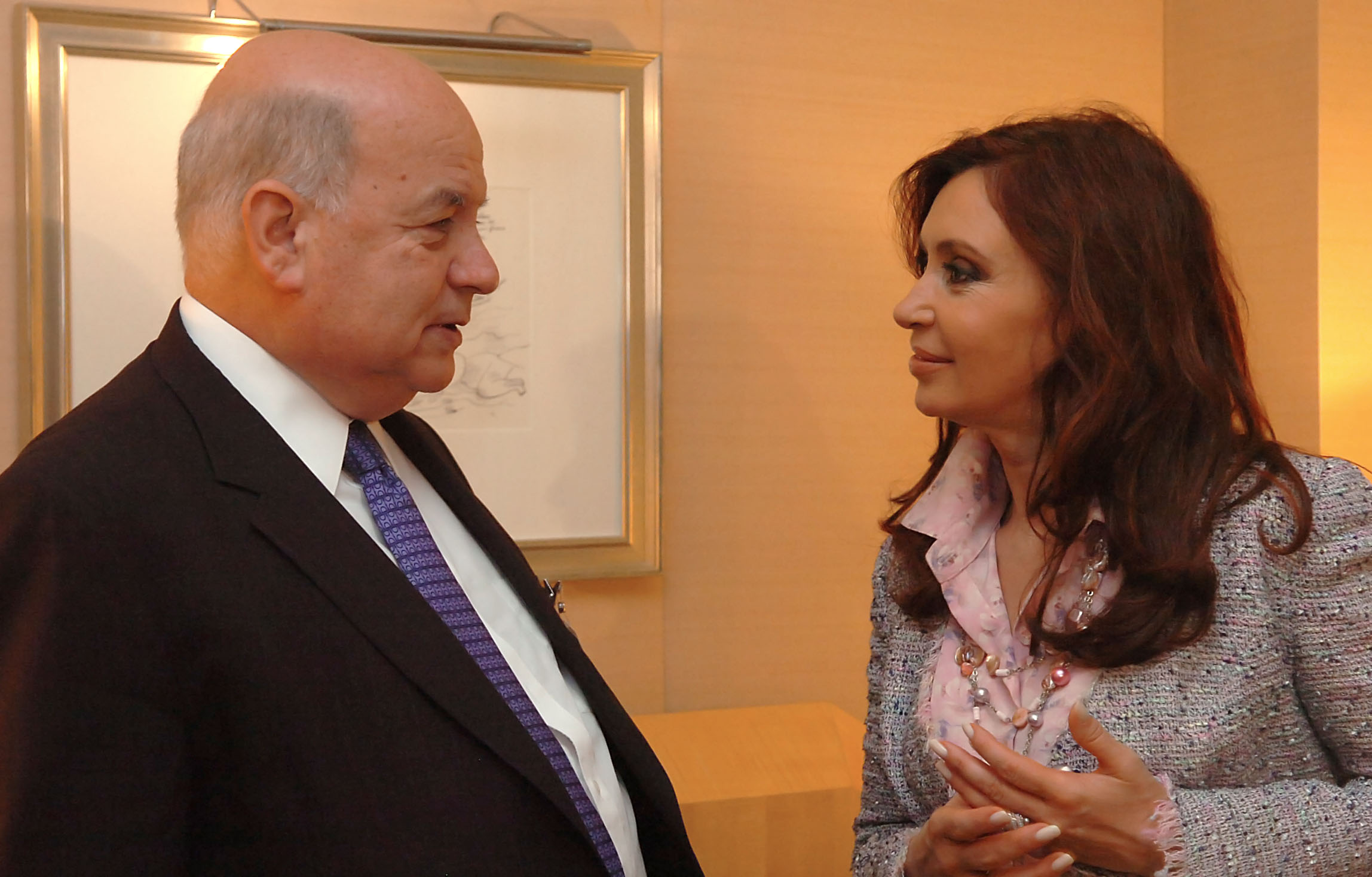 La doctora Cristina Fernández de Kirchner se reunió con el secretario general de la OEA, José Miguel Insulza, en el hotel Four Seasons de esa ciudad.